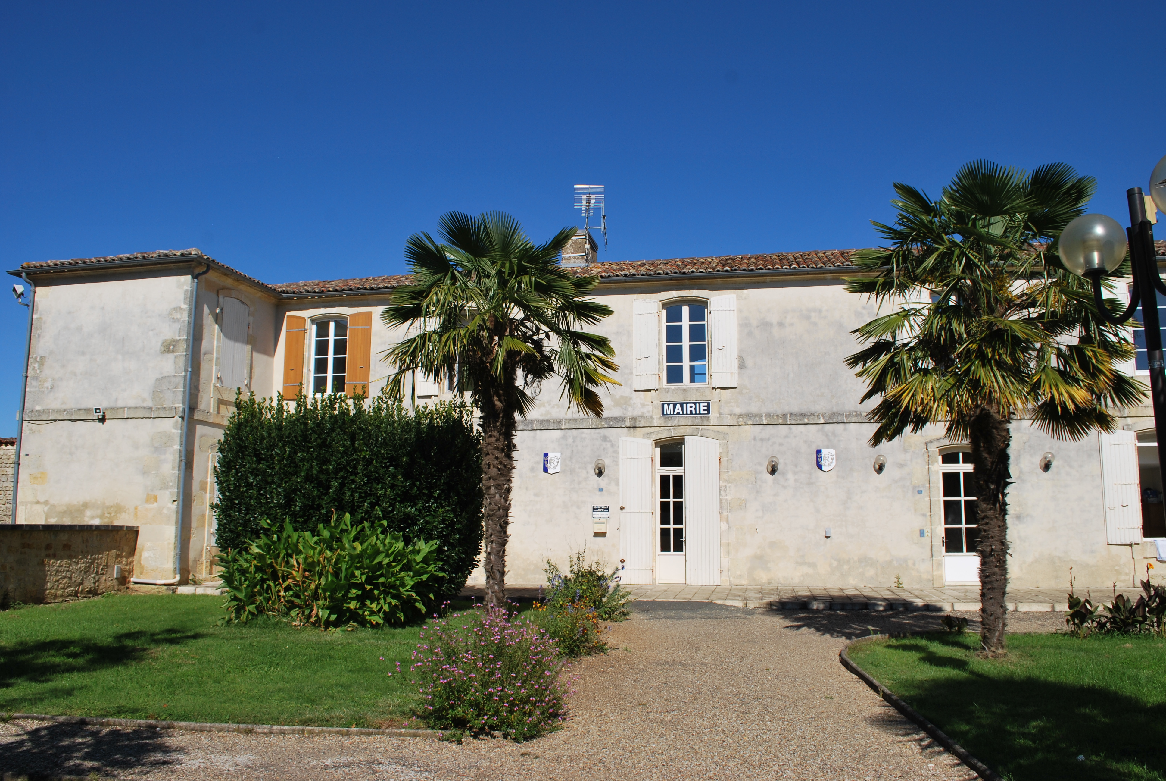 Champagnolles Mairie